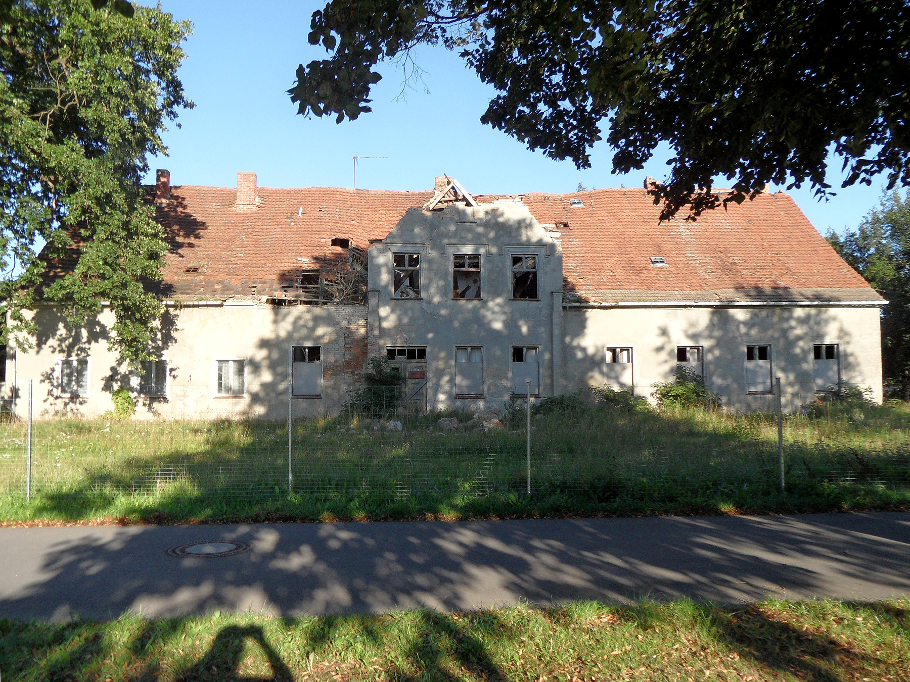 Medow, Amt Anklam-Land, Landkreis Vorpommern-Greifswald, Mecklenburg-Vorpommern: Gutshaus, Hofseite